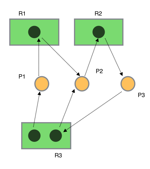 Grafo che rappresenta una situazione di blocco (deadlock) per i processi